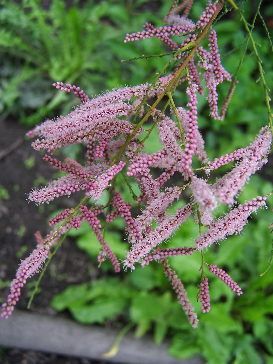 Tamarix ramosissima (pl. tamaryszek rozgałęziony)